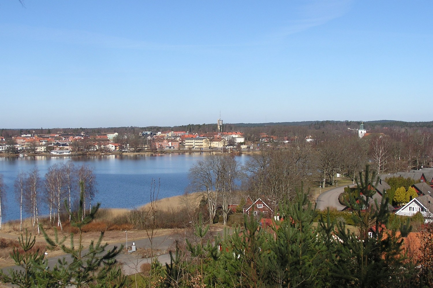 Osby från Ebbarps klint